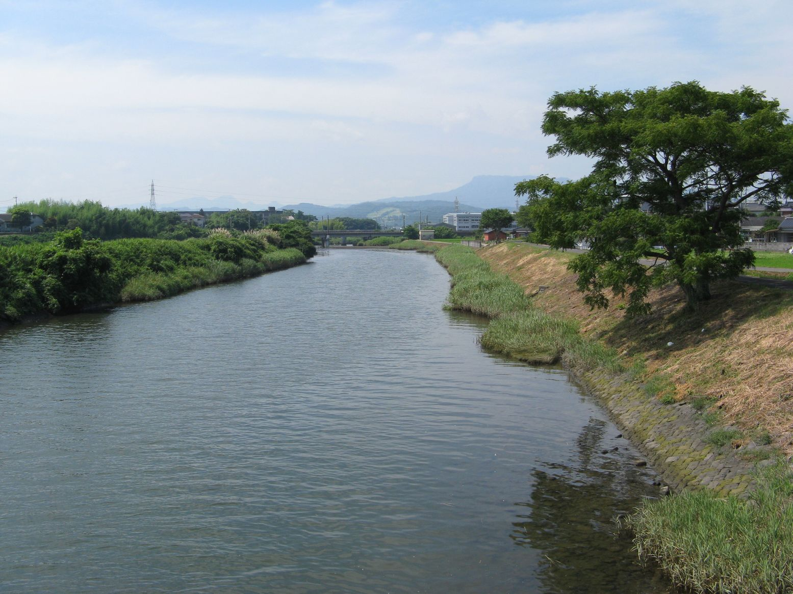 犬丸川 広瀬橋から上流方を望む 奥の橋は日豊本線2008年8月1日 Bakkai撮影